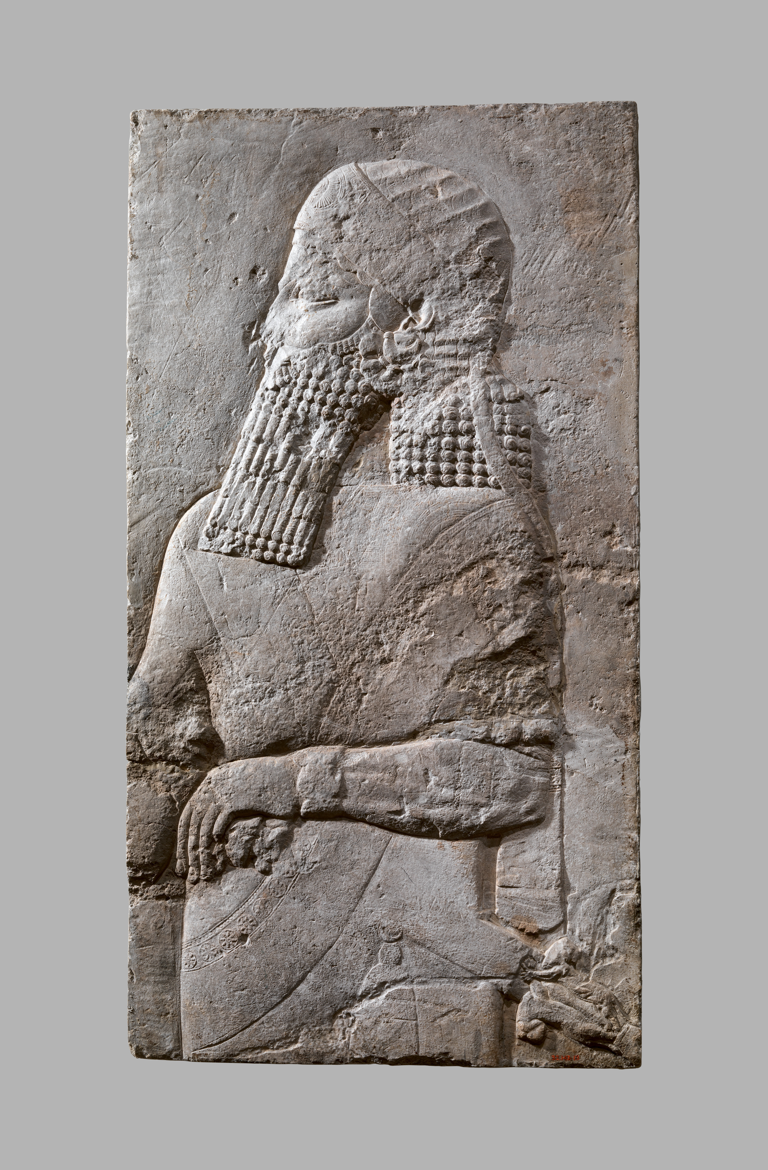 Assyrian; Relief; Stone-Reliefs